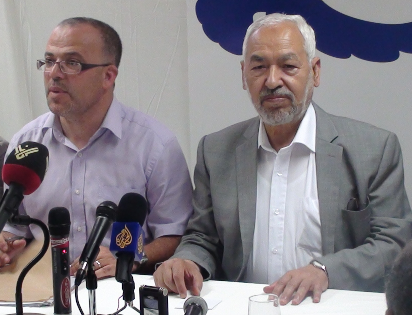 Rached Ghannouchi, président du parti Ennahda, et Samir Dilou, membre de son bureau exécutif, lors d'une conférence de presse